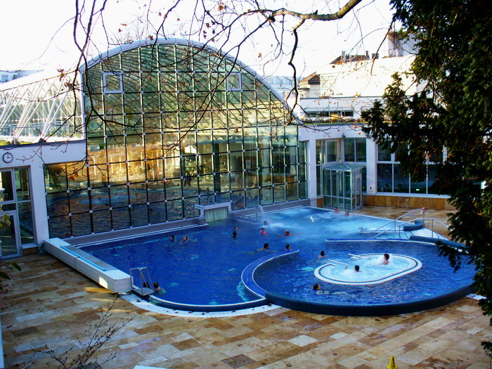 Stuttgart Bad Cannstatt Mineralbad-Thermalbad Cannstatt im Kurpark self made photo by user:Enslin at 8 JAN 2006 in Stuttgart-Bad Cannstatt